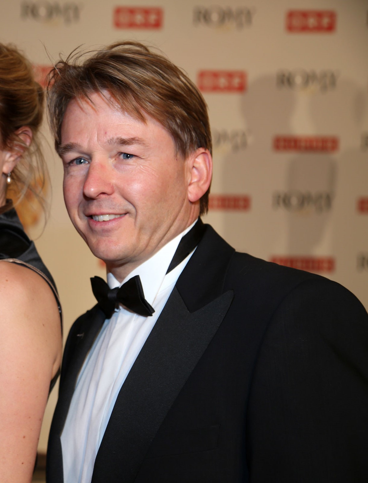 Serge Falck lors des Romy 2015